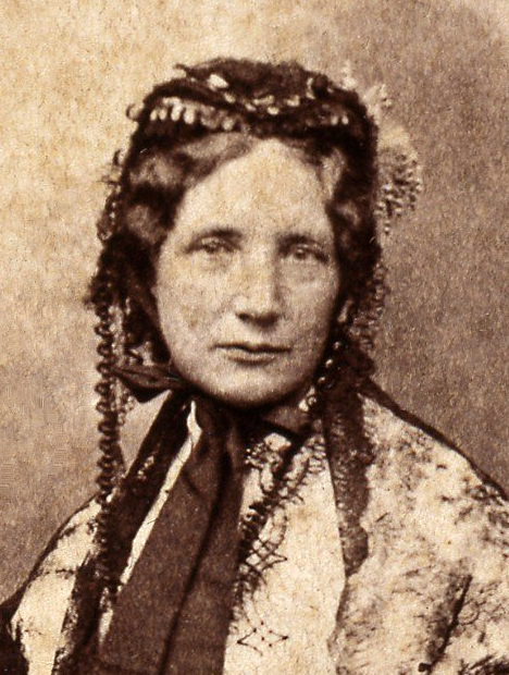 Harriet Beecher Stowe